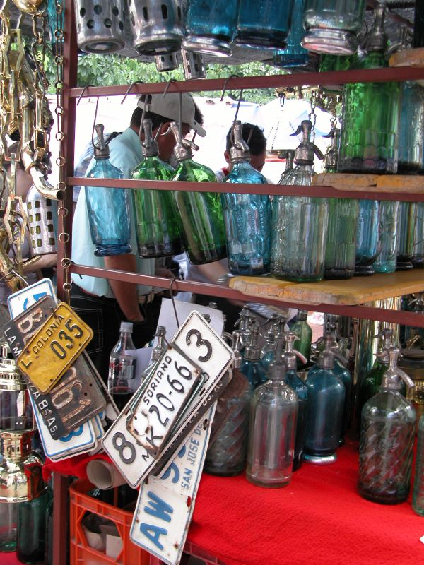 Viejos sifones de soda en una feria en Plaza Dorrego, Buenos Aires, ArgentinaGarrafas na feira